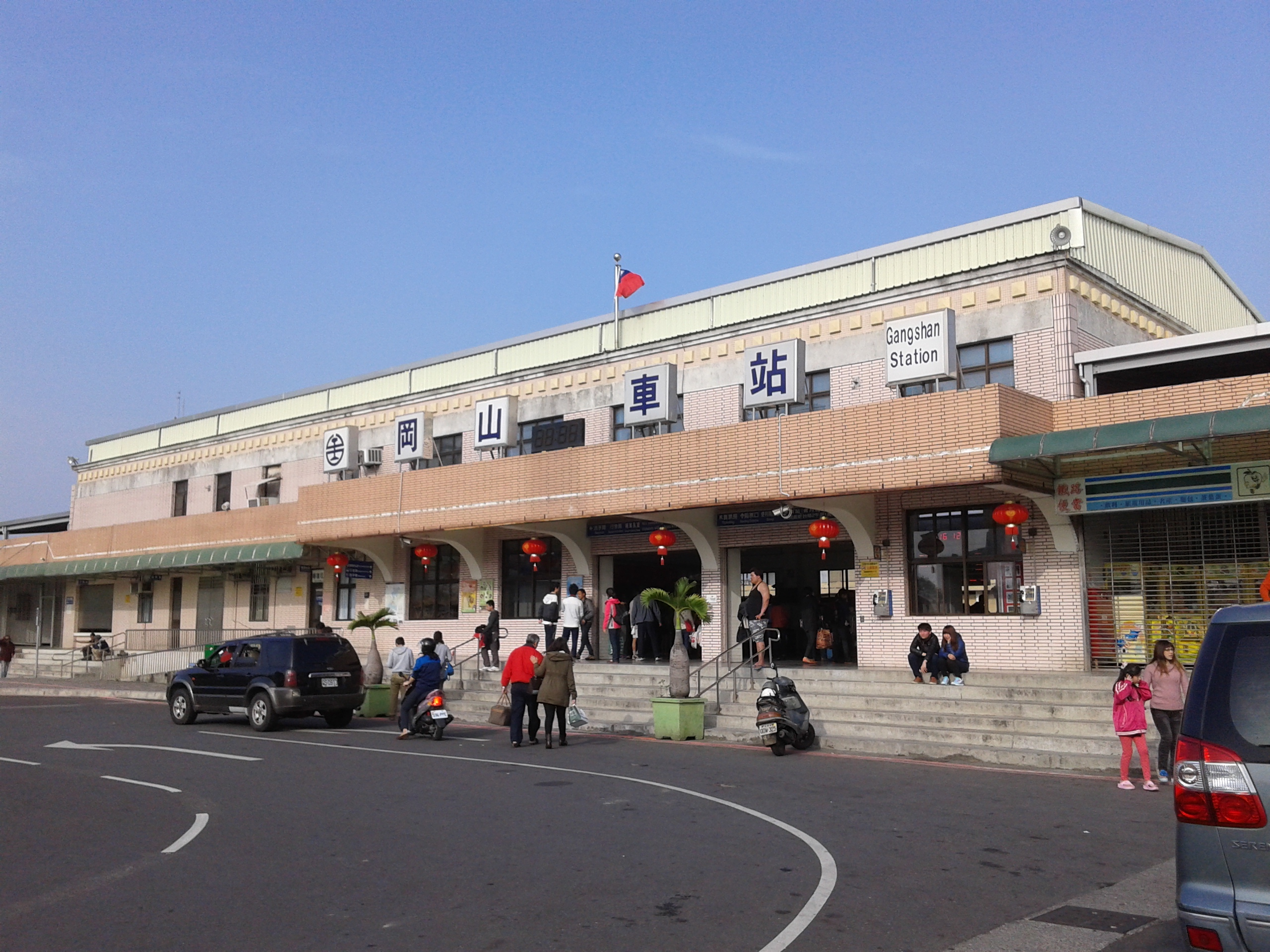 岡山車站 Gangshan Station